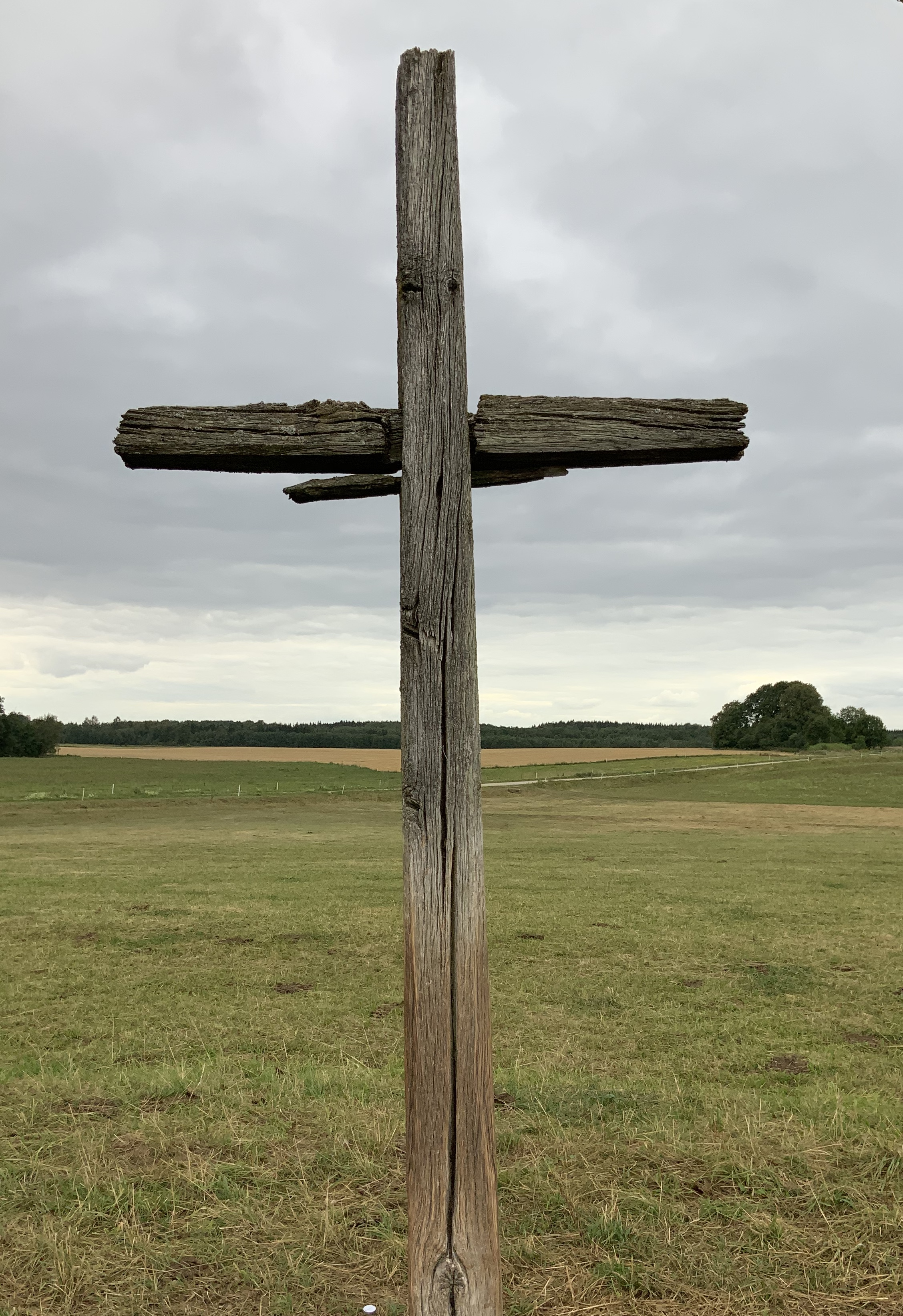 Krzyż w nieistniejącej wiosce Dyskajmie k. Betygoły na Litwie